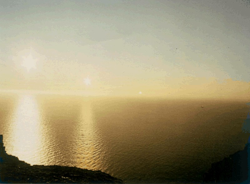 Mitternachtssonne am Nordkap - 22:00, 23:00, 24:00 Uhr